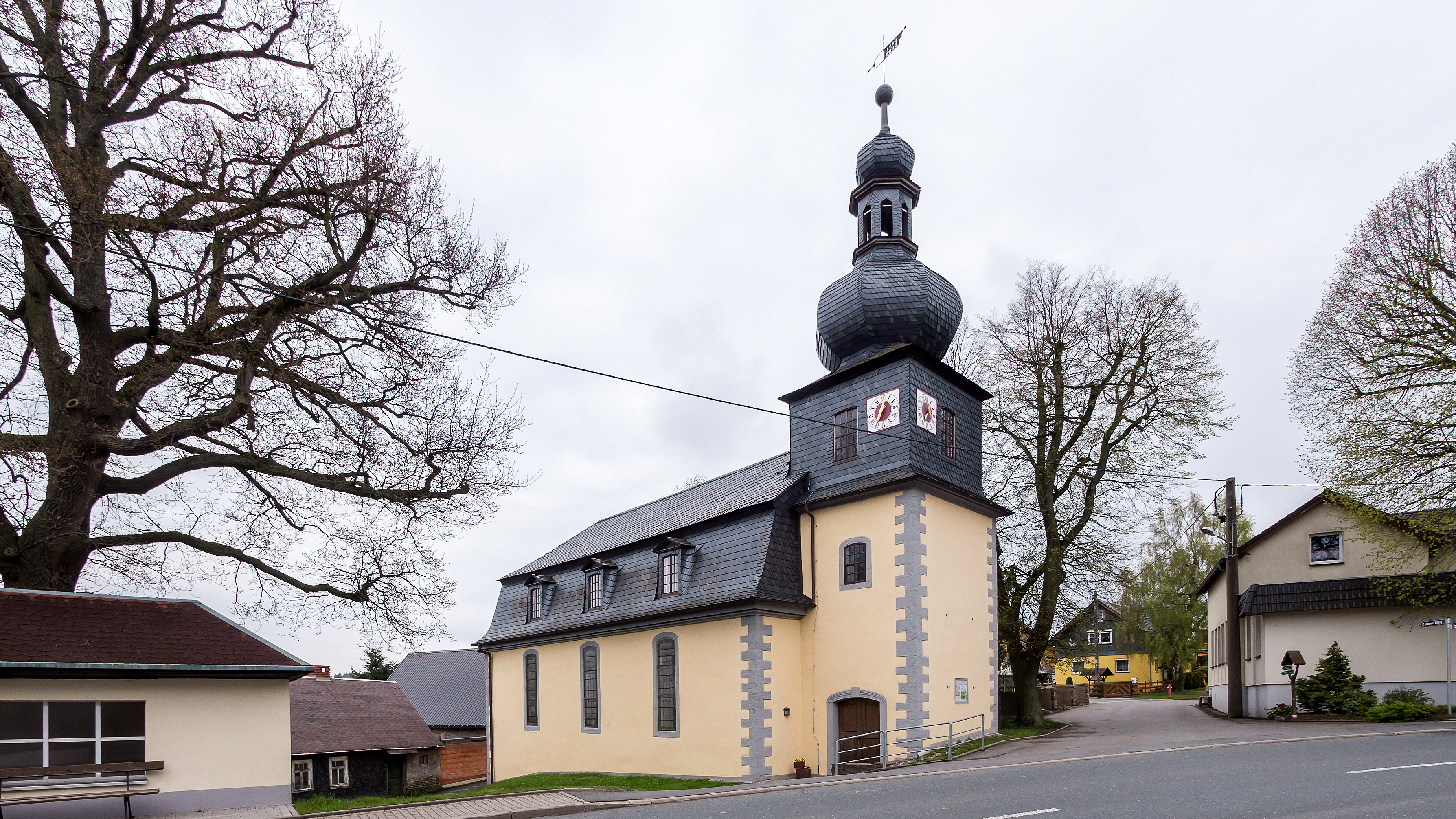 Arnsgereuth Ortsstraße Kirche mit Ausstattung I